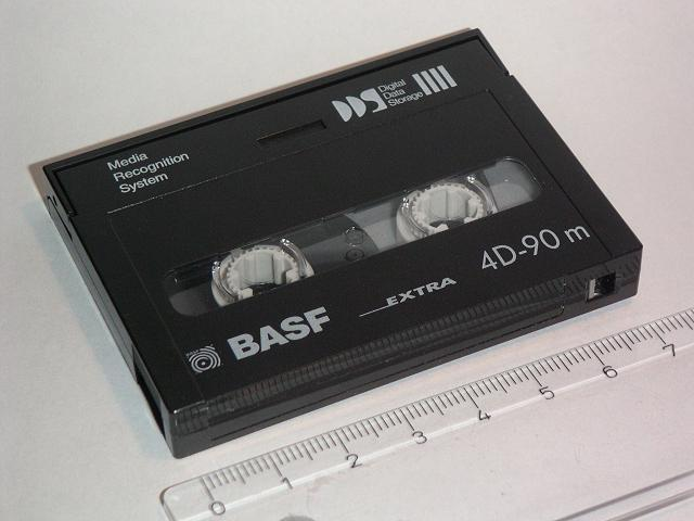 DAT-Kassette